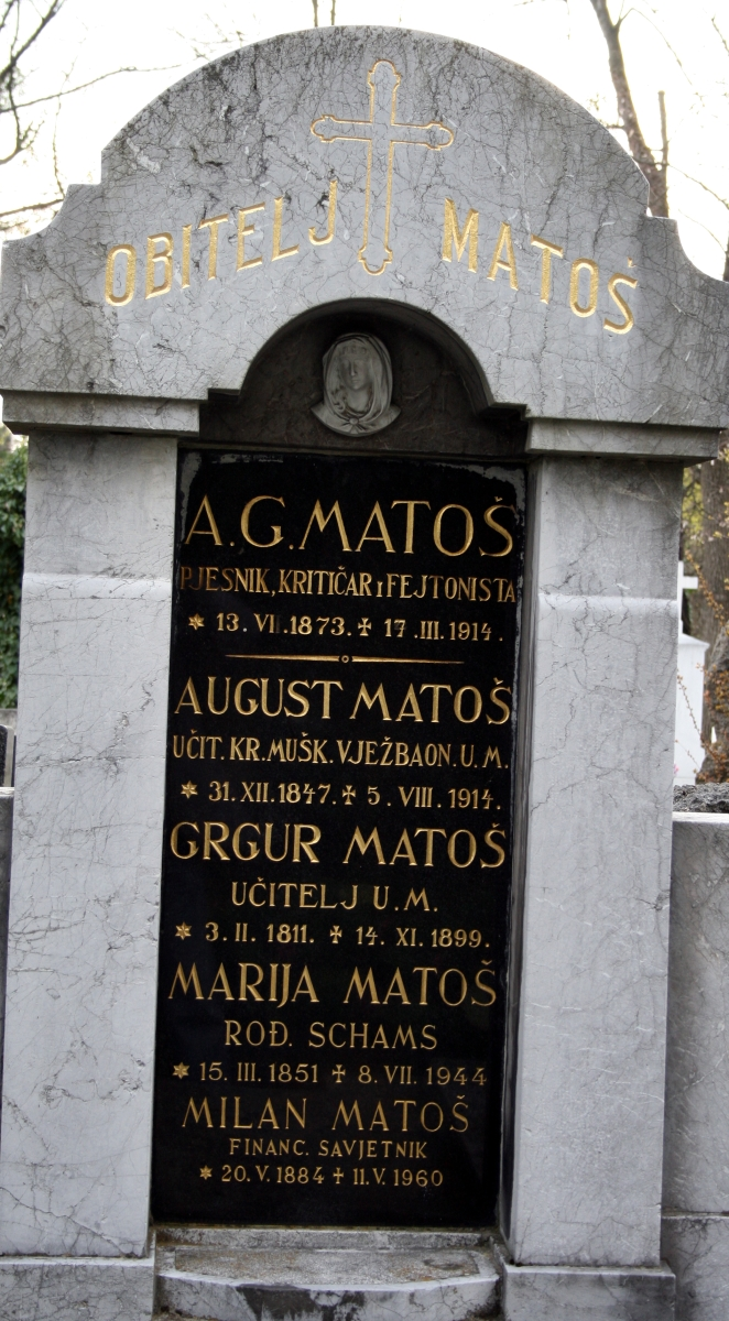 grob Antuna Gustava Matoša na Mirogoju, Zagreb, Hrvatska